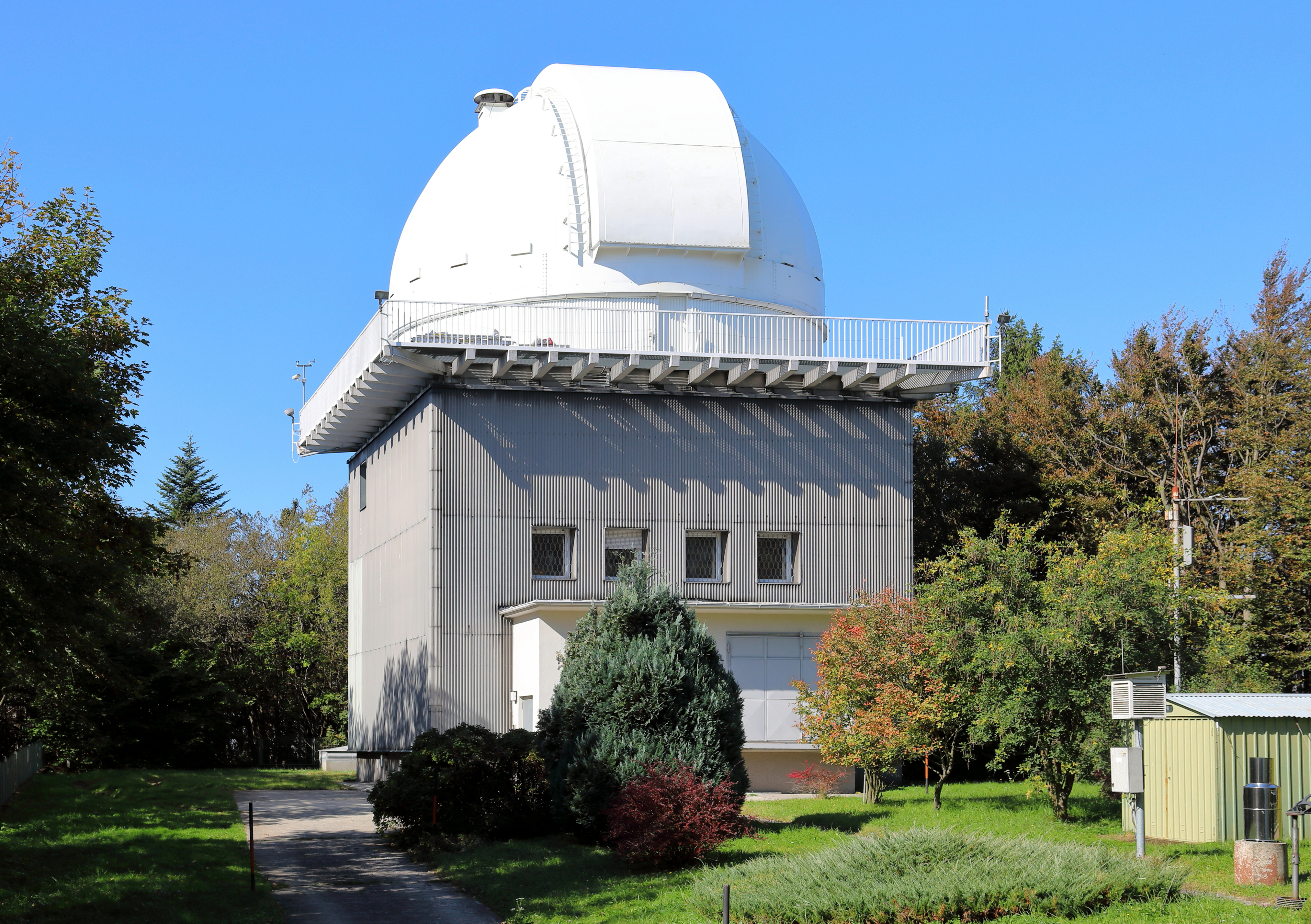 Ostansicht des Leopold-Figl-Observatoriums in der niederösterreichischen Gemeinde Altenmarkt an der Triesting. Die Sternwarte befindet sich auf dem Gipfel des 882 m hohen Mitterschöpfl, ein Vorgipfel des 893 m hohen Schöpfl und unmittelbar südlich zur Gemeindegrenze von Klausen-Leopoldsdorf. Die Grundsteinlegung der nach dem Politiker Leopold Figl benannte Sternwarte fand am 13. September 1966 statt und die offizielle Eröffnung am 25. September 1969. In ihr befindet sich das größte Spiegelteleskop Österreichs mit einem Spiegeldurchmesser von 1,52 m.